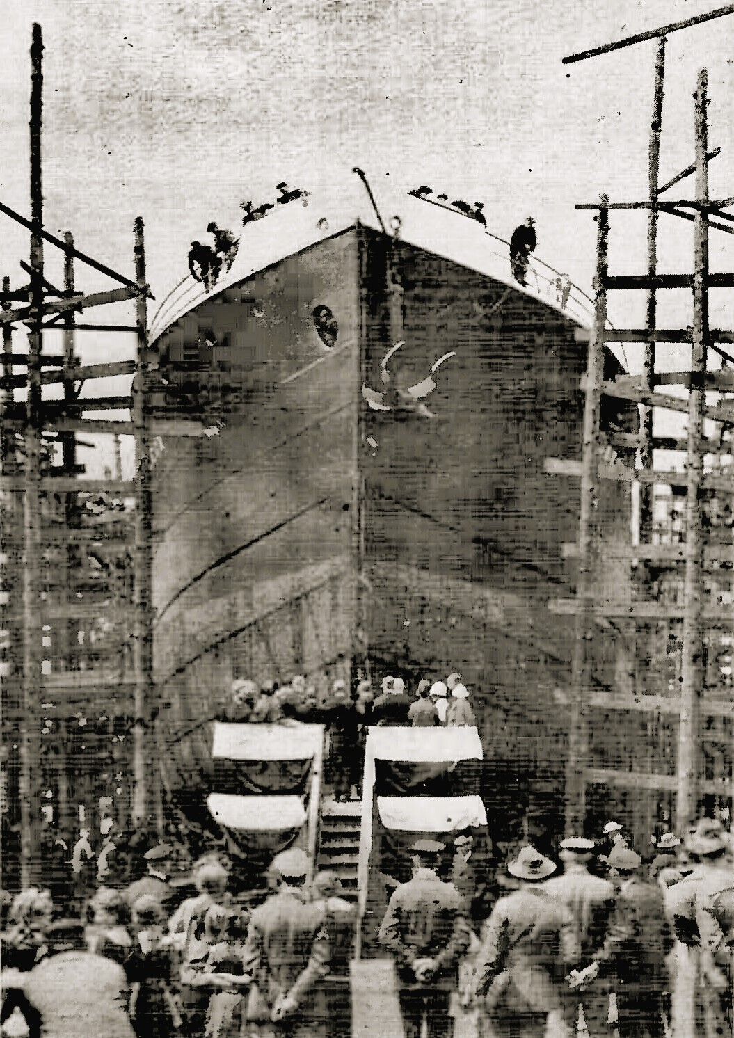 Ein weiterer Dampfer der „Lübeck“-Linie – das drite neue Schiff – wurde am 9. Juli auf der Kochschen Schiffwerft vom Stapel gelassen. Die ersten beiden Schiffe entstammten der Union-Werft in Boizenburg. Weitere Neubauten wurden von der Flender-Werft und den Travewerk geliefert. Das Schiff sollte eine Tragfähigkeit von 2500 t haben, Länge 79.5 m, Breite über den Spanten 12,35 m, Seitenhöhe zum Hauptdeck 5,494 m, Tiefgang 16‘3‘‘. Eine Dreifach-Expansionsmaschine von 900 PS gab dem Schiff eine Geschwindigkeit von 9 ½ Seemeilen in beladenem Zustand. Handelskammerpräses Ernst Boie hielt die Taufrede, Frau Senator Dr. Kalkbrenner benannte das Schiff unter den üblichen Formalitäten mit dem Namen „Lübeck“. Das Bild gibt den Taufakt wieder.